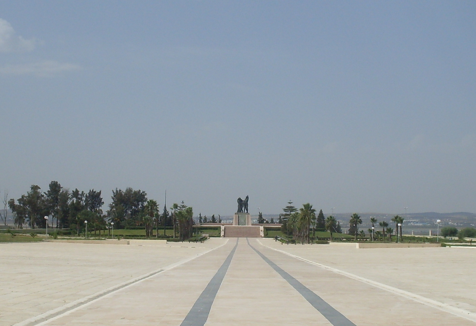 Monument des martyrs du Sijoumi Tunisie